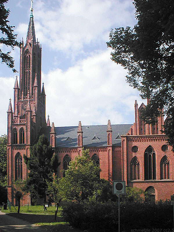 Klosterkirche in Malchow